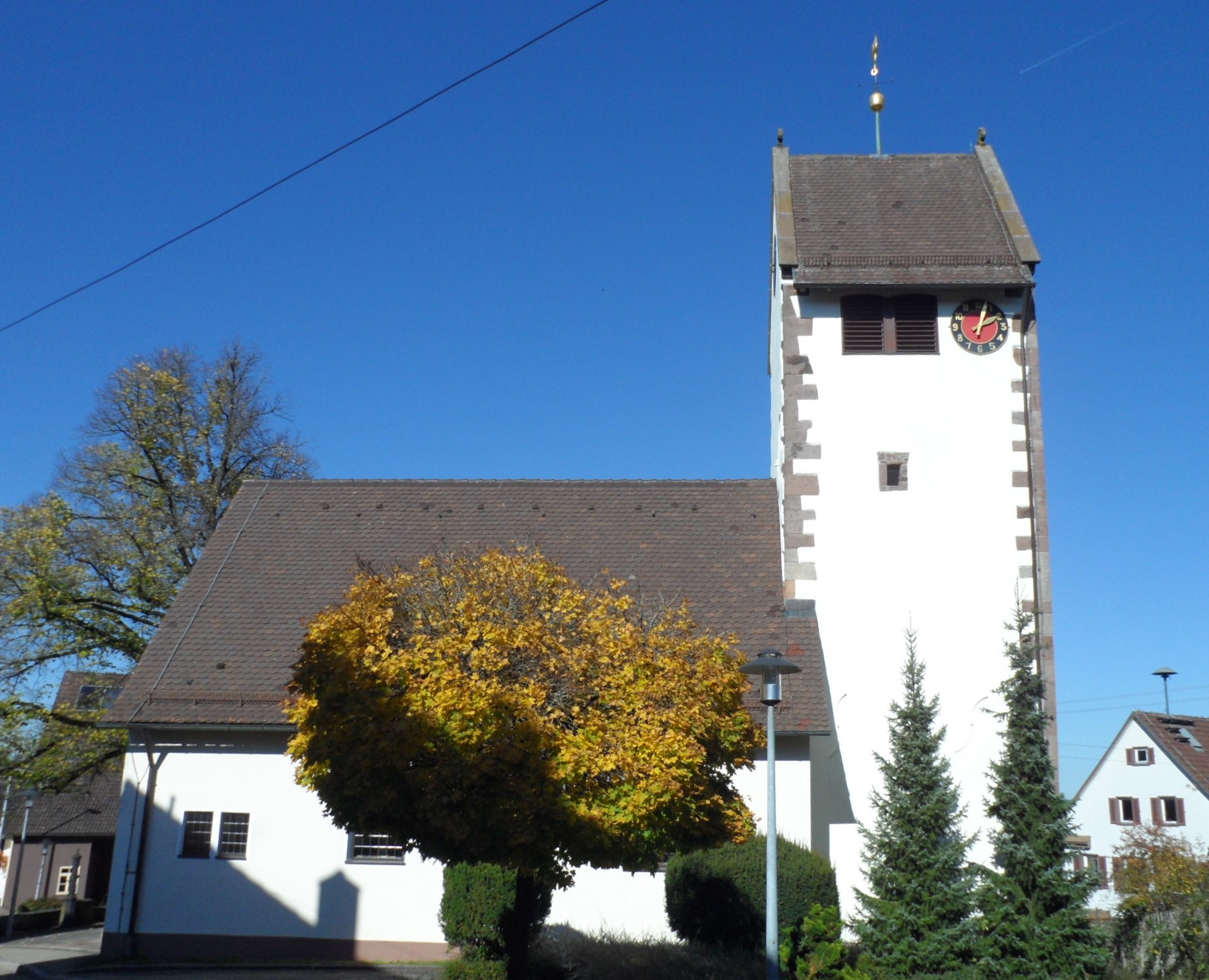 Kirche Martinsmoos, betreut von der Pfarrei Zwerenberg, Kirchenbezirk Calw